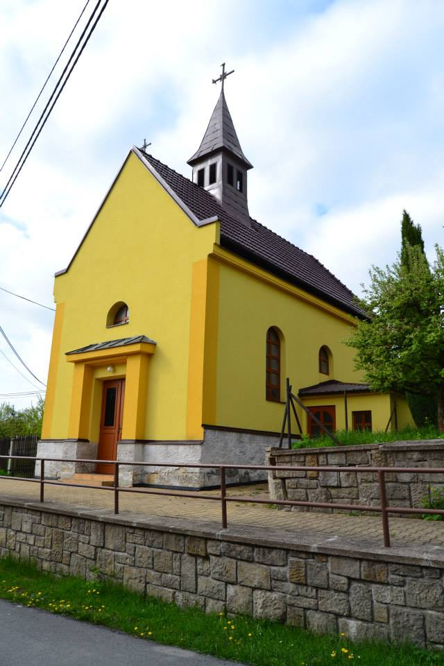 Petřkovice - kaple